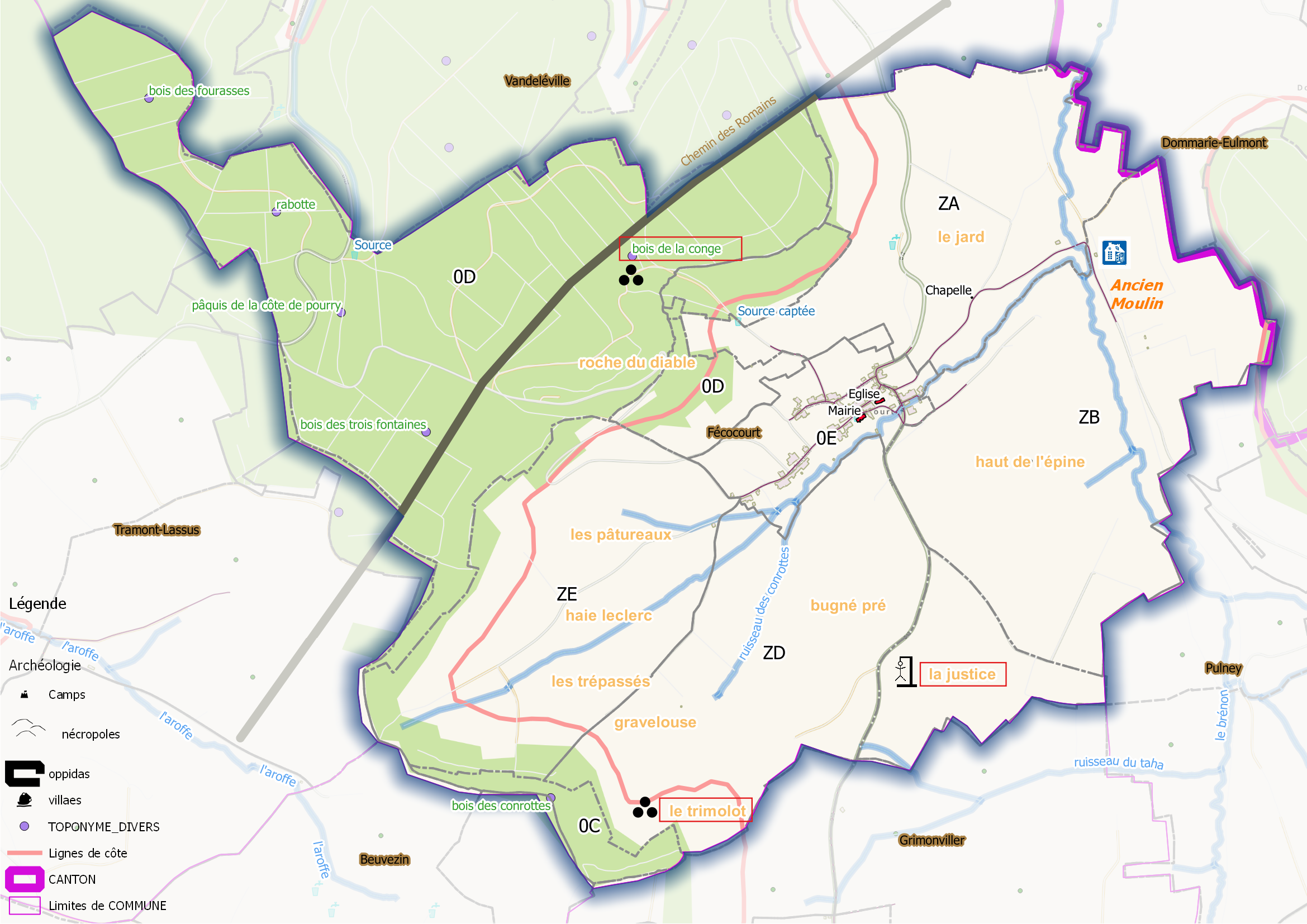 Fécocourt (ban communal) OSM et Qgis, mentions additionnelles